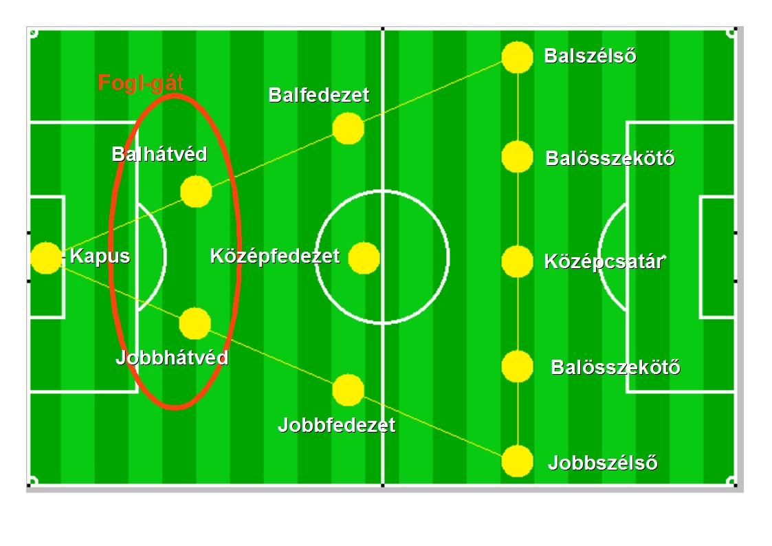 A Fogl-gát, a magyar válogatott felállása az első világháborút követő időszakban.